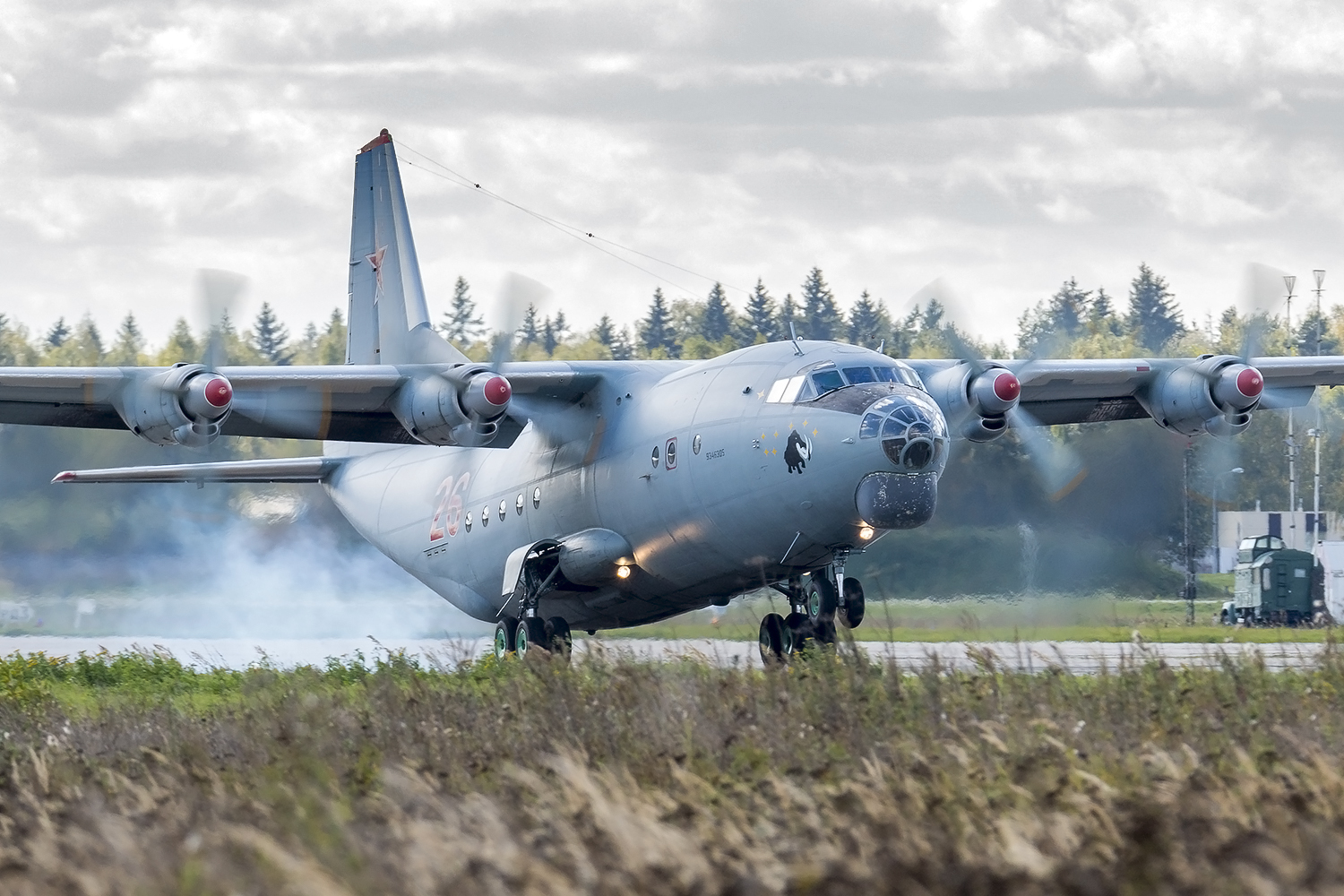 Antonov An12BK-PPS 26RED